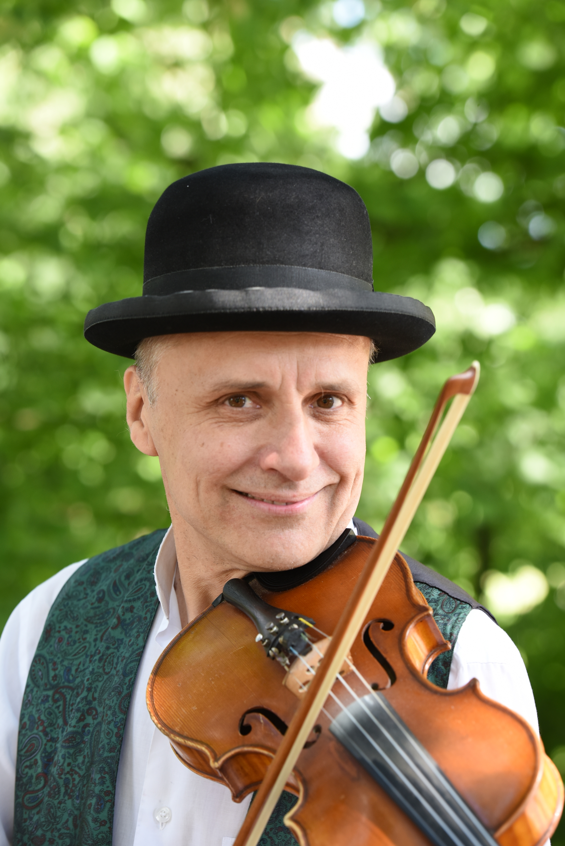 Rafał Szpotakowski - członek polskiego zespołu muzycznego Kapela Warszawska.